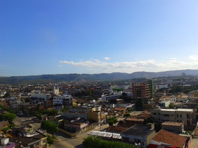 Vista parcial do centro da cidade da Vitória de Santo Antão, bairro da Matriz